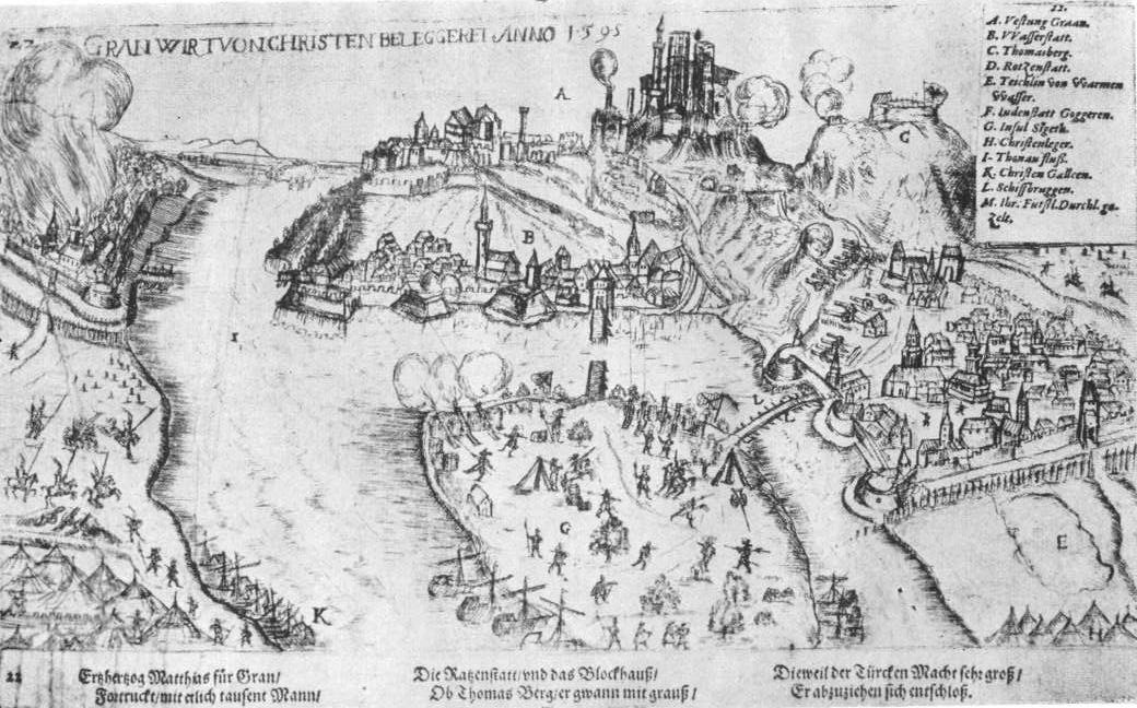 Esztergom ostroma 1595